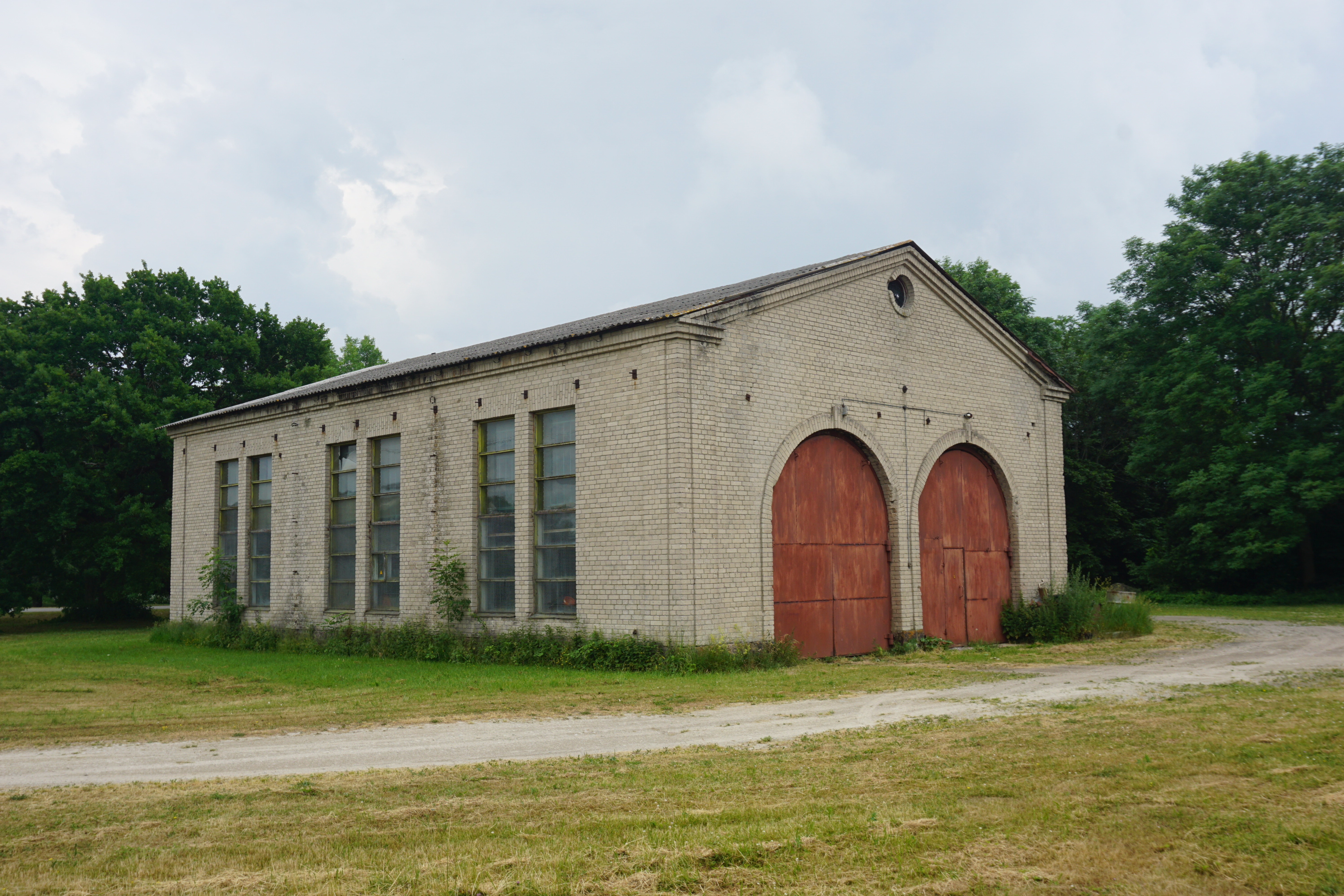 Endine veduridepoo Virtsus